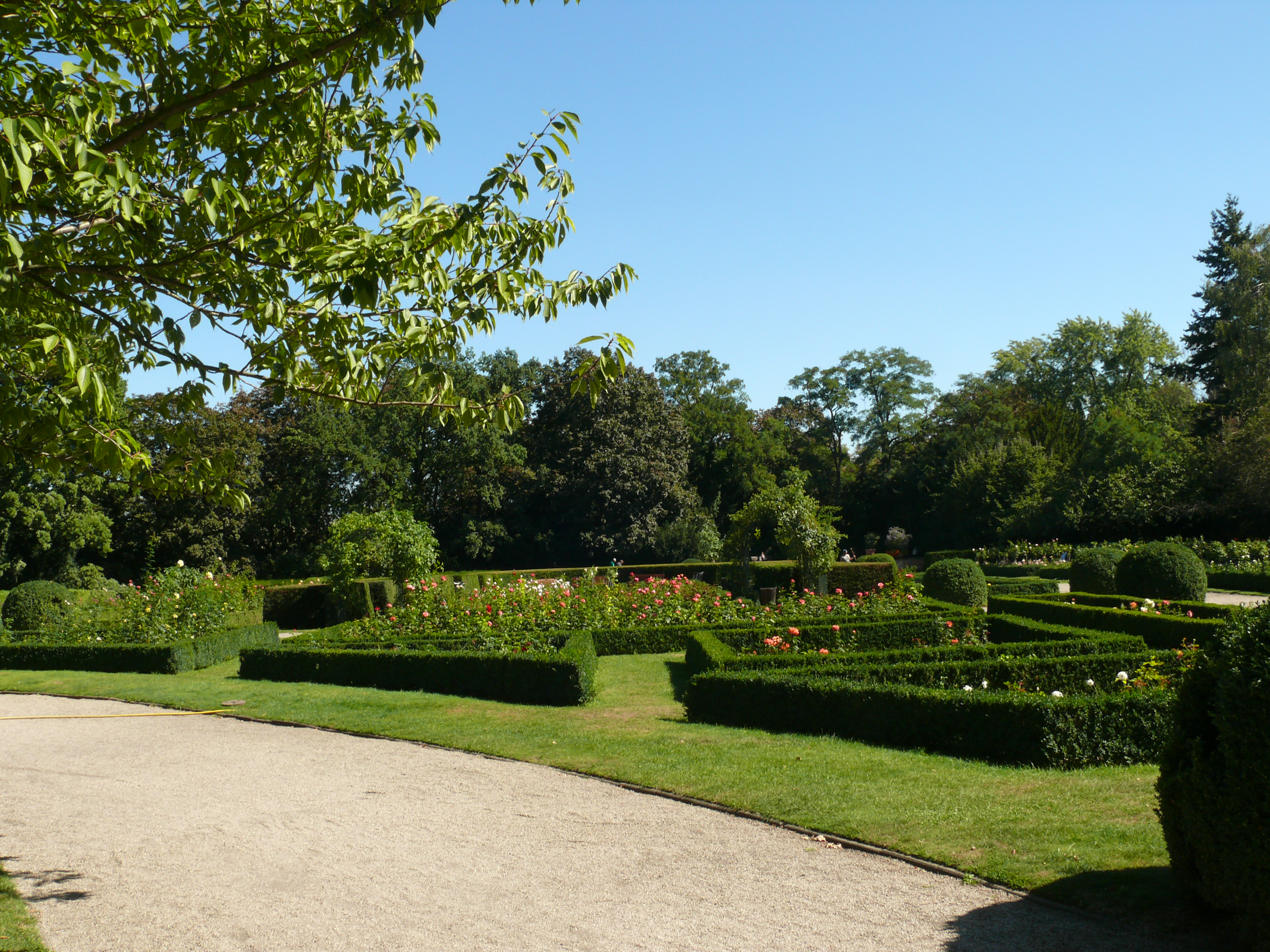 Berlin-Gesundbrunnen Humboldthain Rosengarten